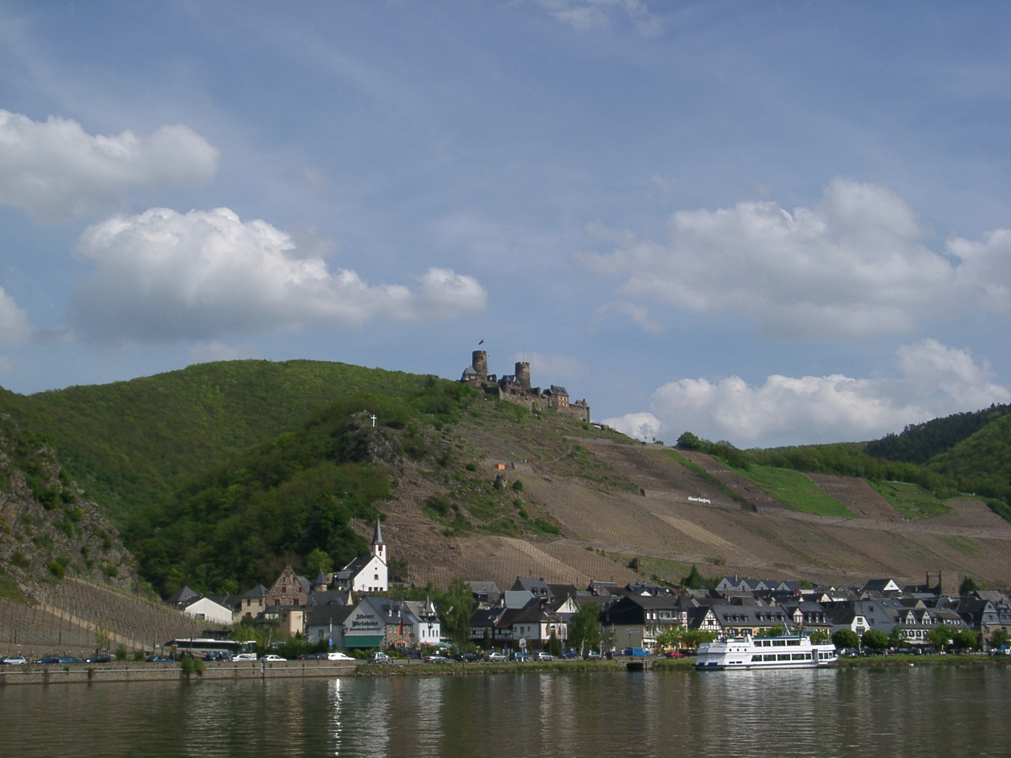 Alken (Untermosel) vom anderen Moselufer